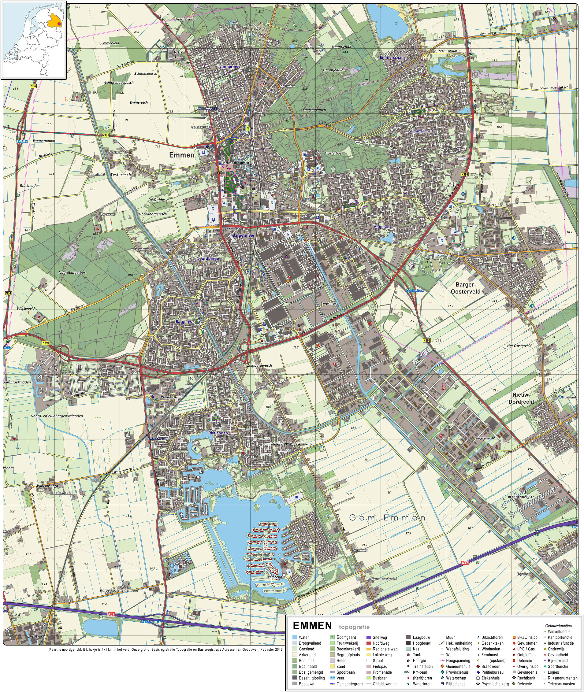 Topografisch beeld van de stad Emmen. Op basis van de GML open geodata van de BRT/Top10NL (basisregistratie Topografie, Kadaster 2012), vrijgegeven door Kadaster op 30-11-2012 onder de Creative Commons BY licentie. Gebouwvlakken vanuit Open Geodata BAG extract (december 2012). Samenstelling en kleurenschema: Jan-Willem van Aalst.